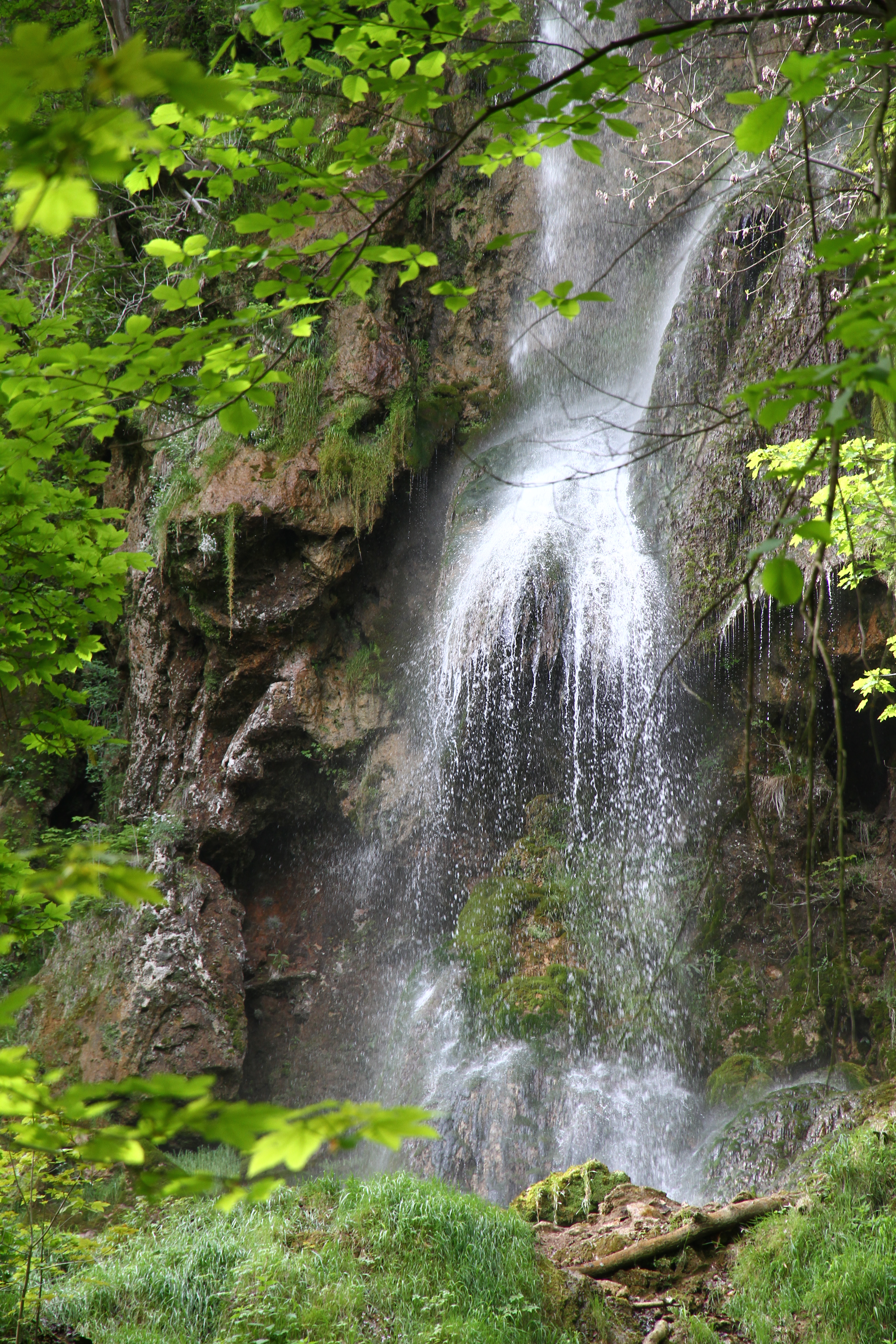 Uracher Wasserfall auf der Uracher Alb im NSG 4.112 „Rutschen“